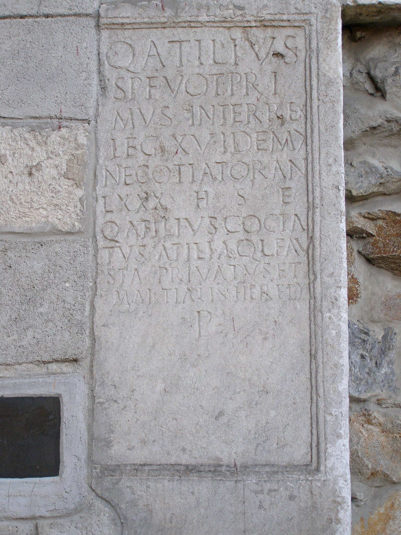 Boldog (okr. Senec), Kostol Nanebovzatia Panny Márie; rímsky nápis zamurovaný do juhovýchodnej fasády kostola. Pochádza z obdobia rokov 90 - 130 po Kr. a je najstarším nápisom svojho druhu na Slovensku